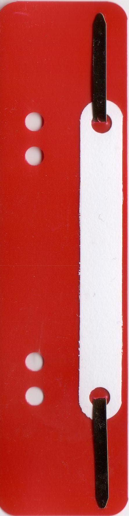 Heftstreifen aus Plastik Scanned by me! Date: 18.03.2005, DPI: 300, Colourdepth: 24 Bit